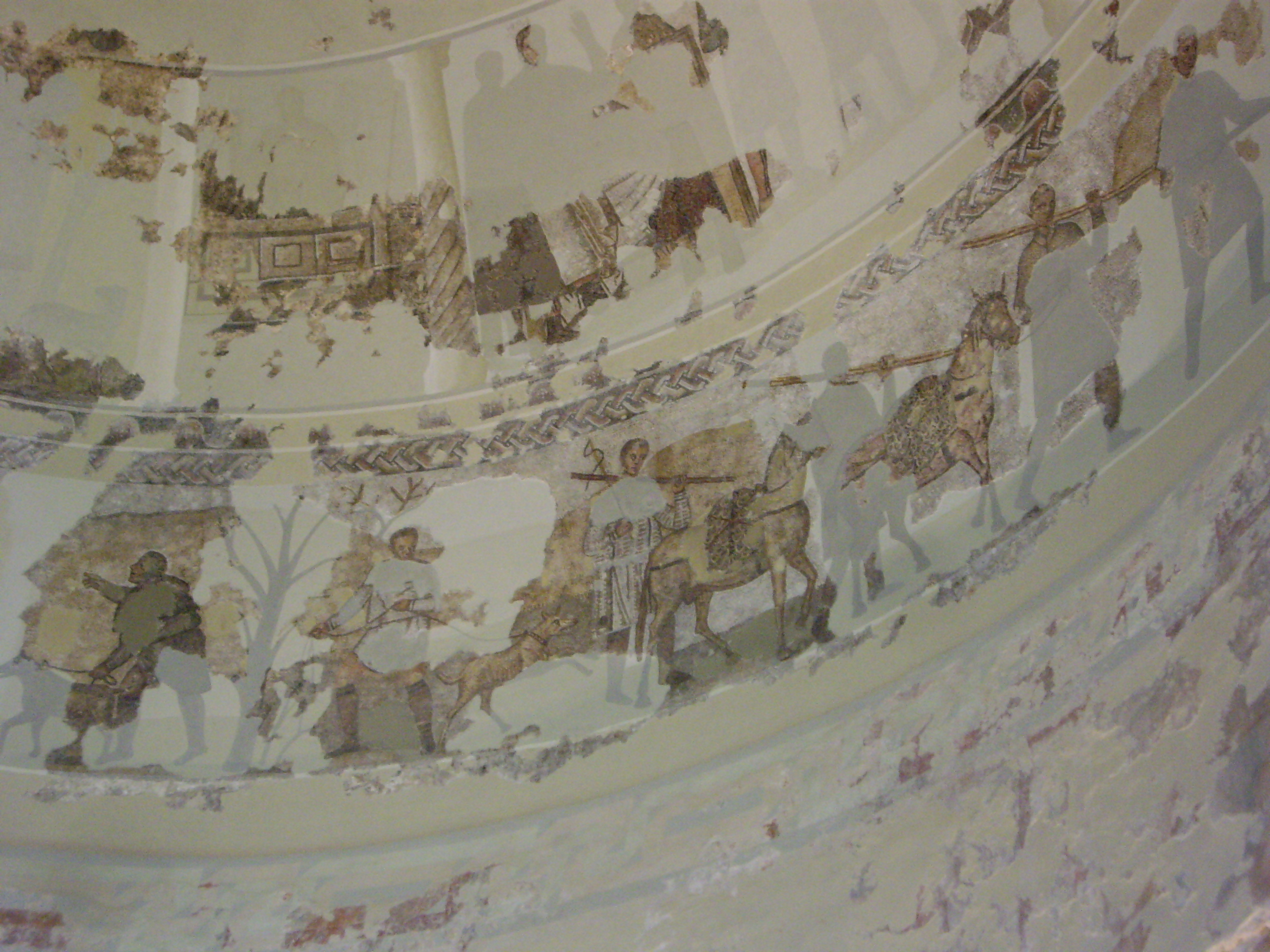 Mosaics de Centcelles, s'hi poden observar 2 frisos de mosaics i en la part inferior un de pintura mural.